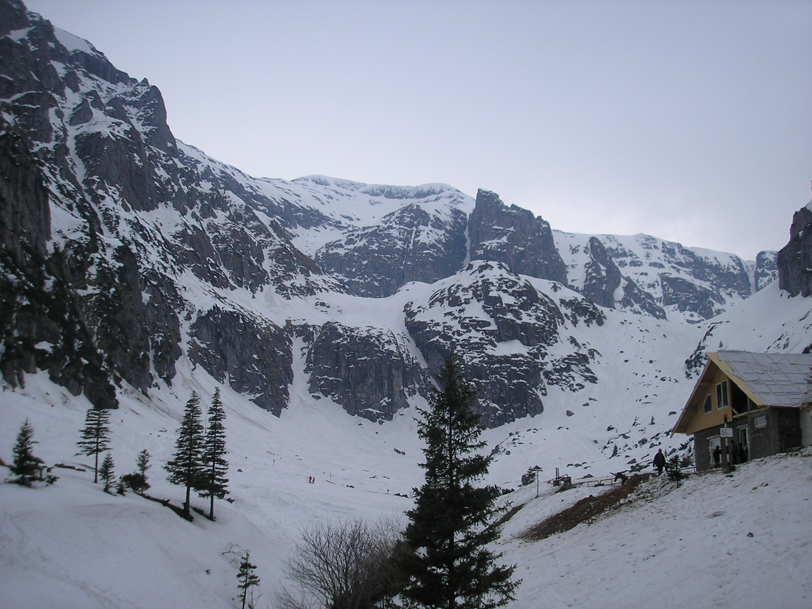 Cabana Malaiesti, Muntii Bucegi